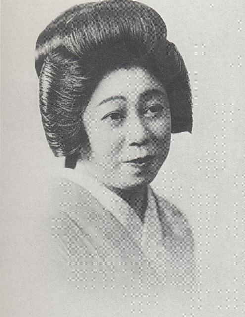 1930年代に発売されたブロマイドをスキャン